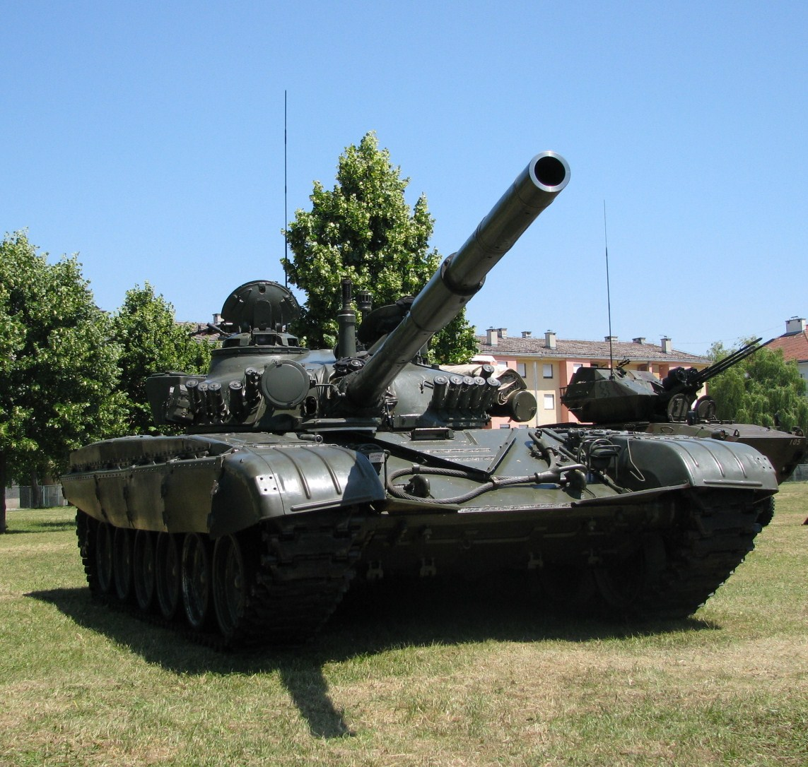 Tenk M-84